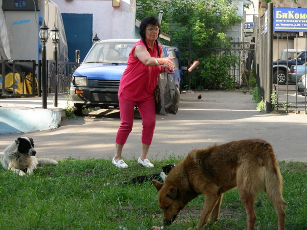 Житель Москвы подкармливает бездомных животных на улице Усиевича